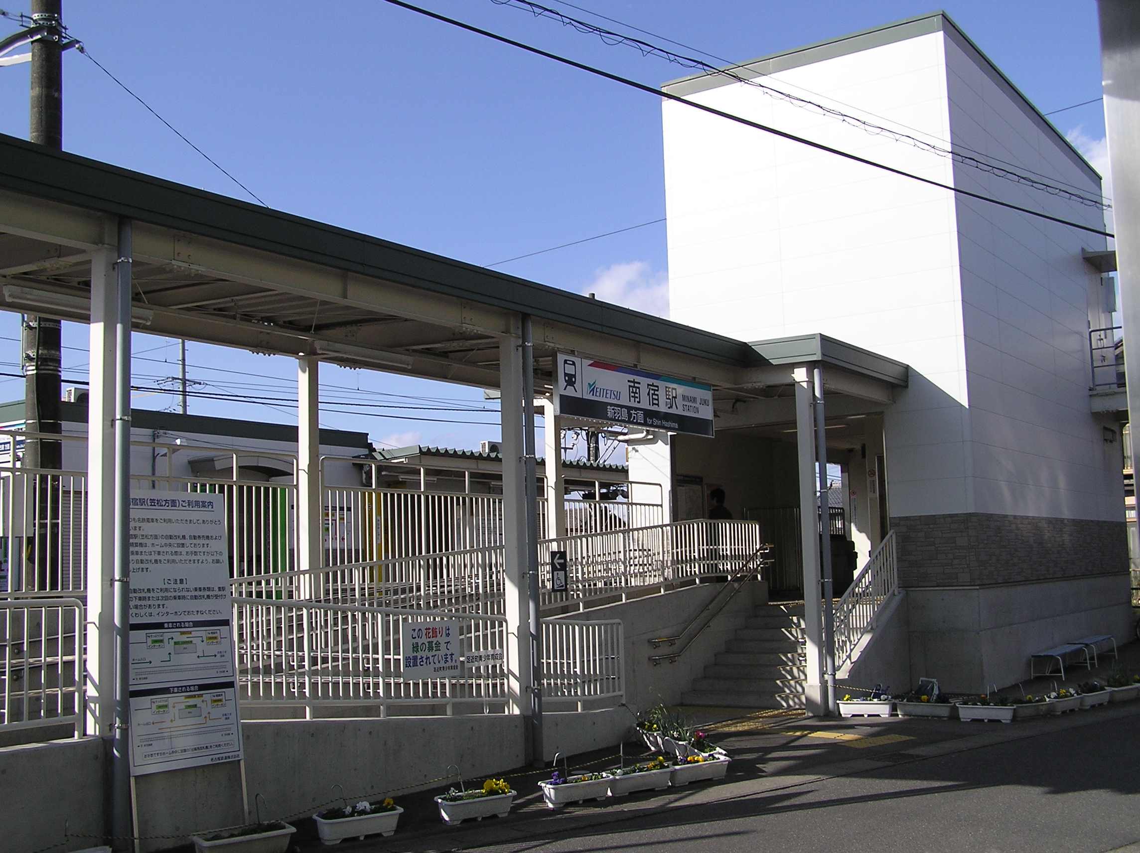 名古屋鉄道竹鼻線南宿駅)